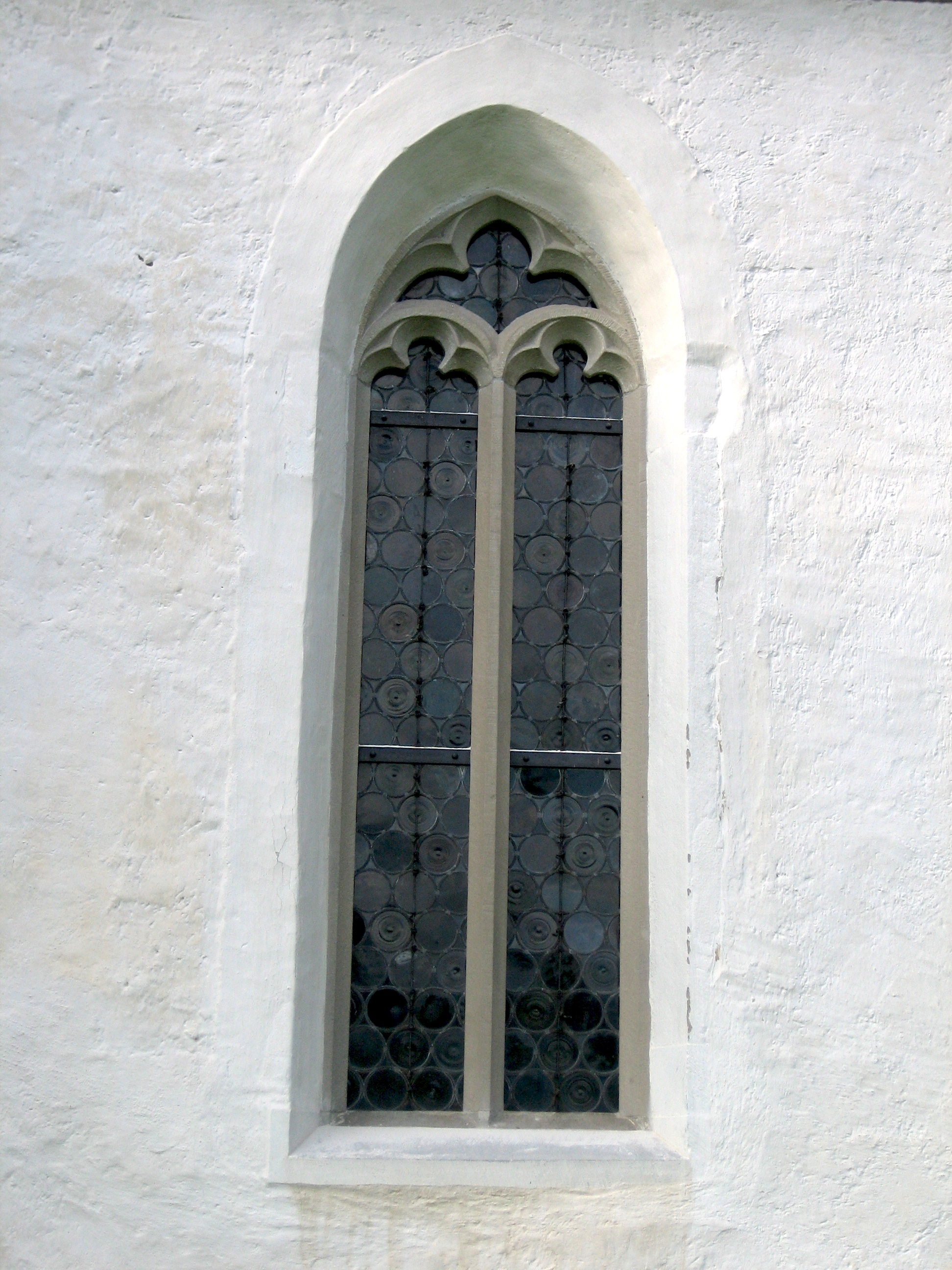 St.Dionys:Masswerkfenster an der südlichen Chorwand